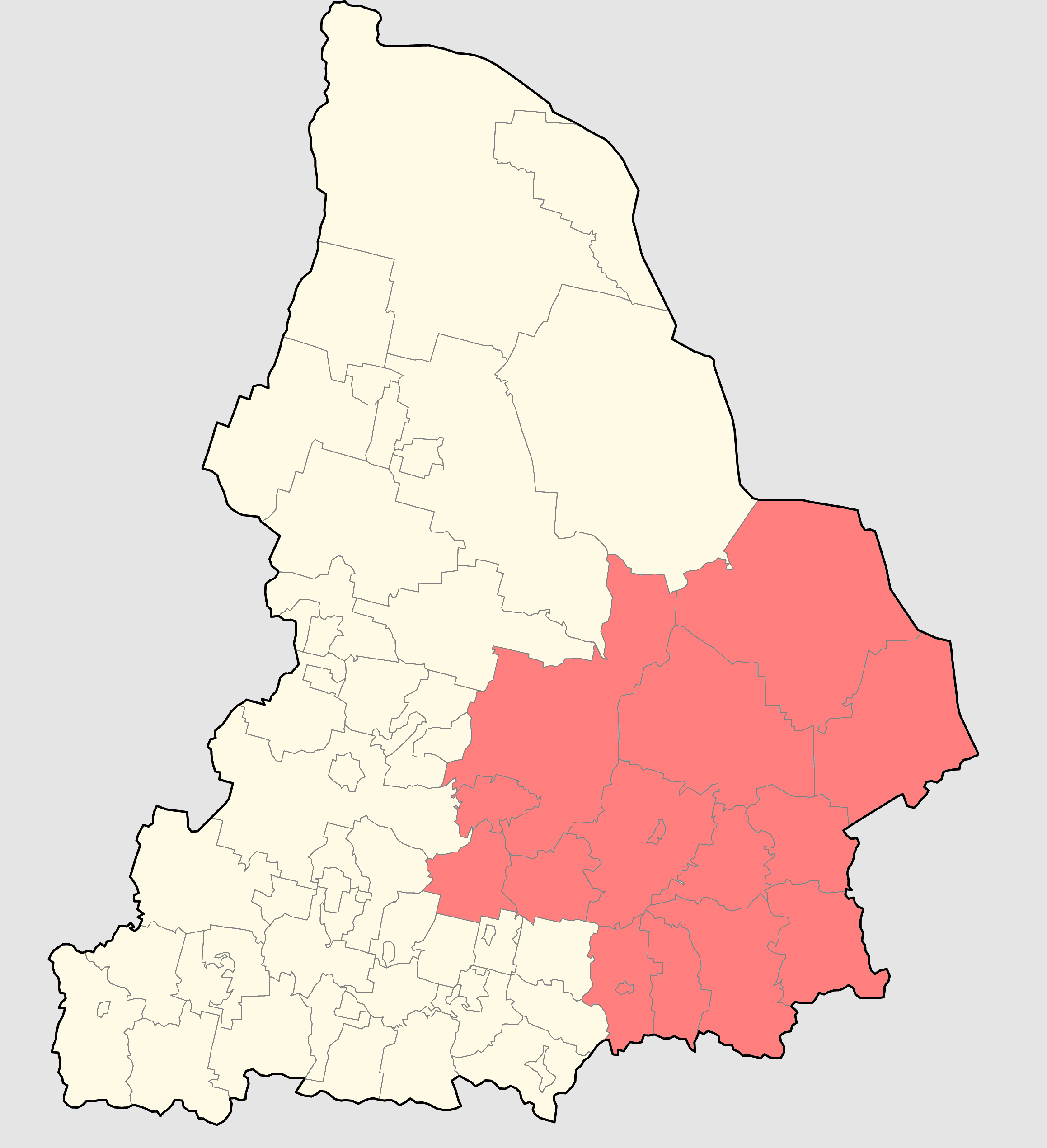 Восточный управленческий округ Свердловской области